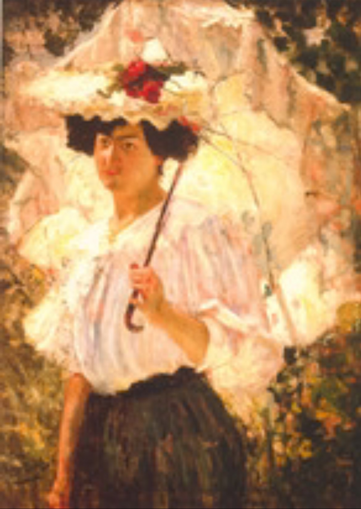 Óleo sobre tela de Pedro Reszka Moreau, nació en Antofagasta, Región de Antofagasta, Chile el 10 de junio de 1872 y falleció en Santiago de Chile 6 de marzo de 1960) fue un importante pintor chileno.